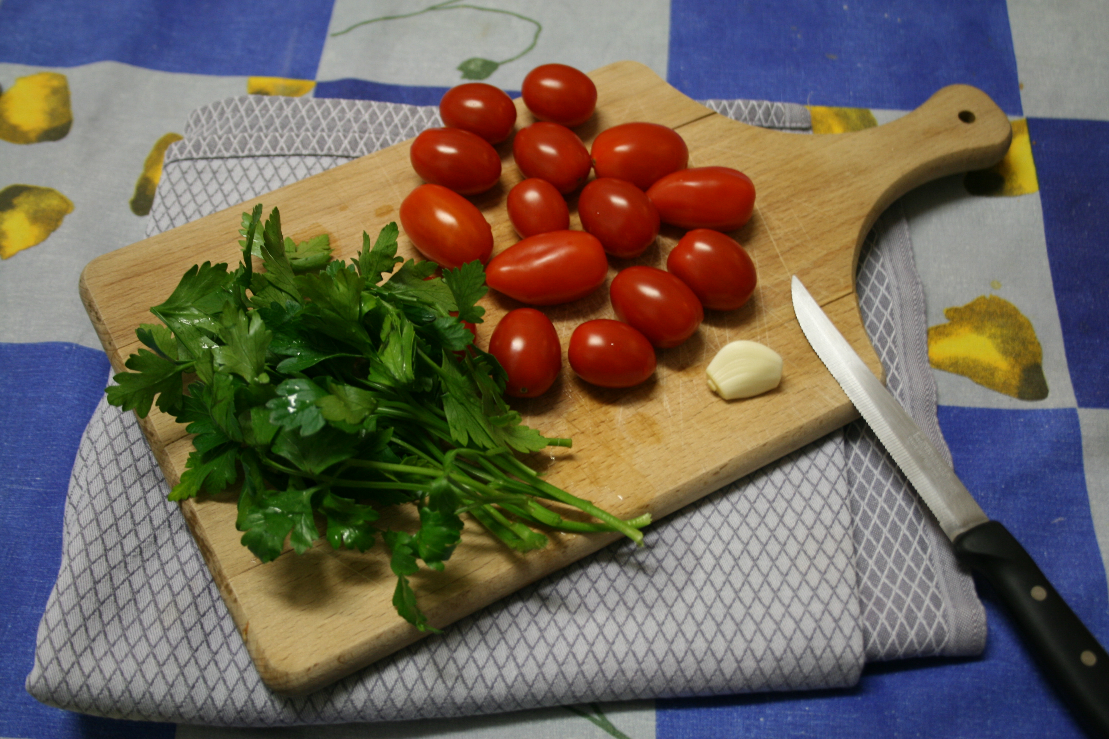 Un tagliere in legno con coltello e ingredienti per il soffritto di un sugo al pesce: Aglio, pomodorini pachino IGP e prezzemolo a cui poi vanno aggiunti i frutti di male e olio extra vergine di oliva